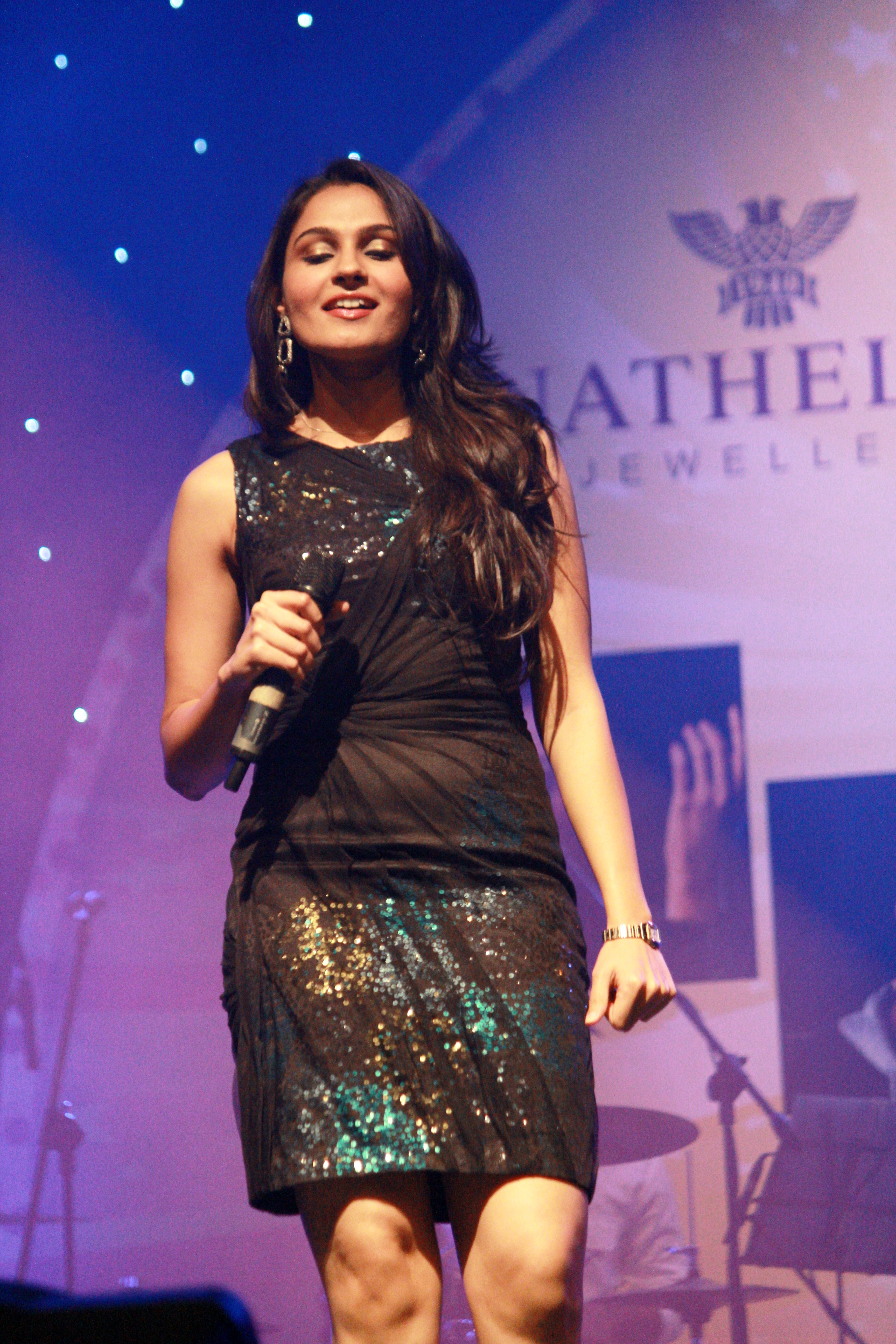 Andrea Jeremiah in 2013